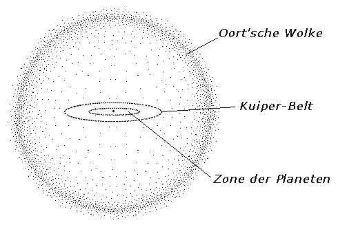 Oort'sche Wolke Schema Zeichnung Dr. H. Sulzer (Benutzer:herbye), Bad Muskau Mar 2004, GNU FDL